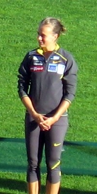 Sari Keskitalo Kalevan kisoissa, Ratinan stadionilla, Tampereella, 26. heinäkuuta 2008